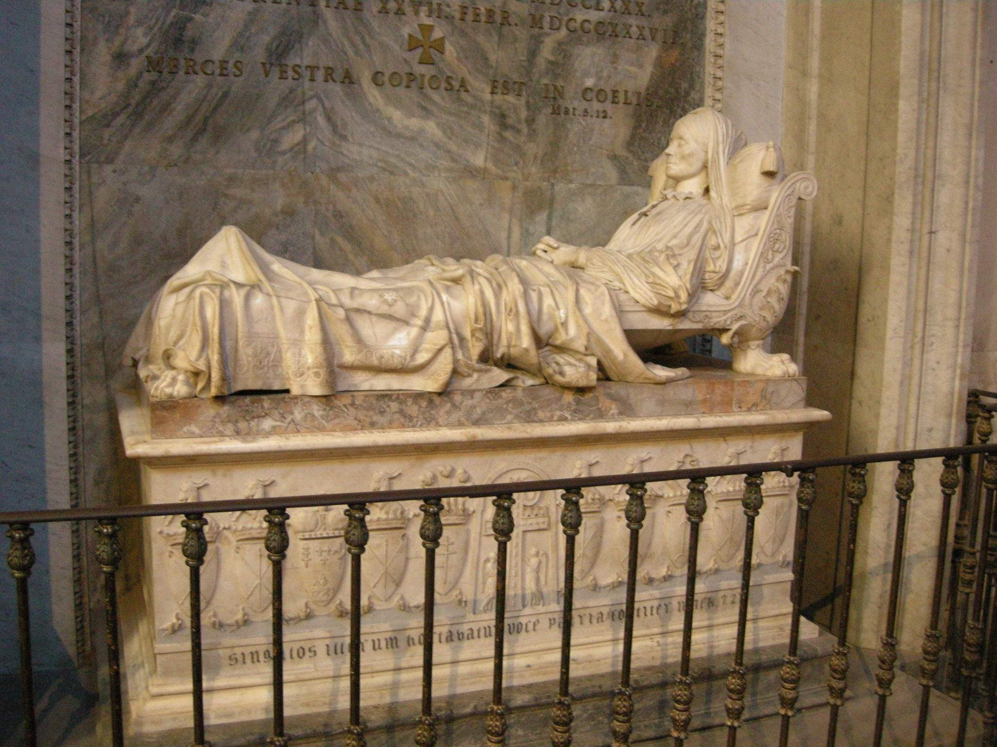 Cappella Machiavelli-Salviati nella chiesa di Santa Croce a Firenze - Tomba della contessa Sofia Zamoyska, opera di Lorenzo Bartolini (1837-44).